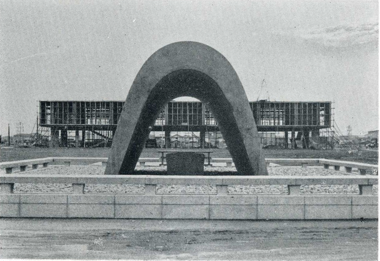 完成直後の原爆死没者慰霊碑。後ろは建設中の広島平和記念資料館。